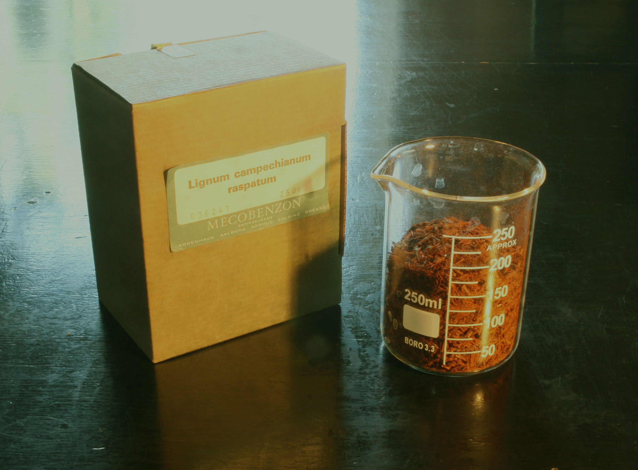 Raspet kampechetræ